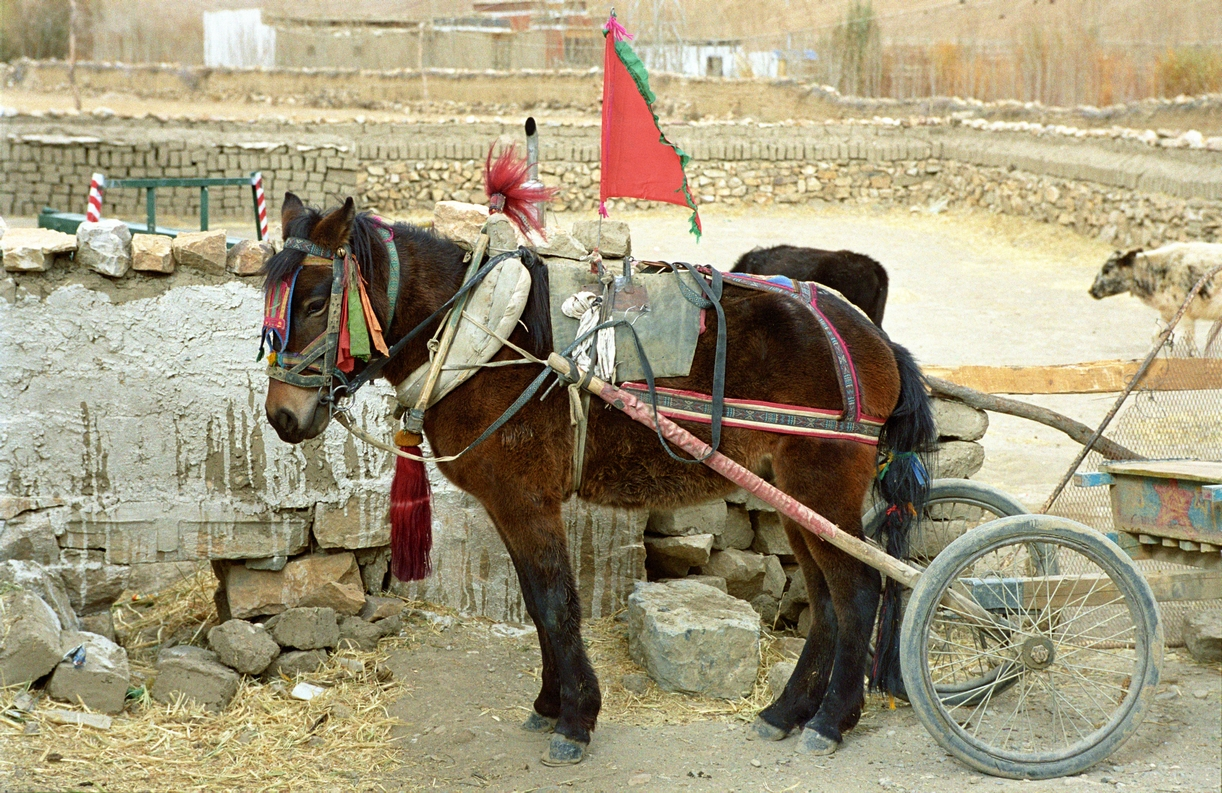 Tibet ,Pedruk